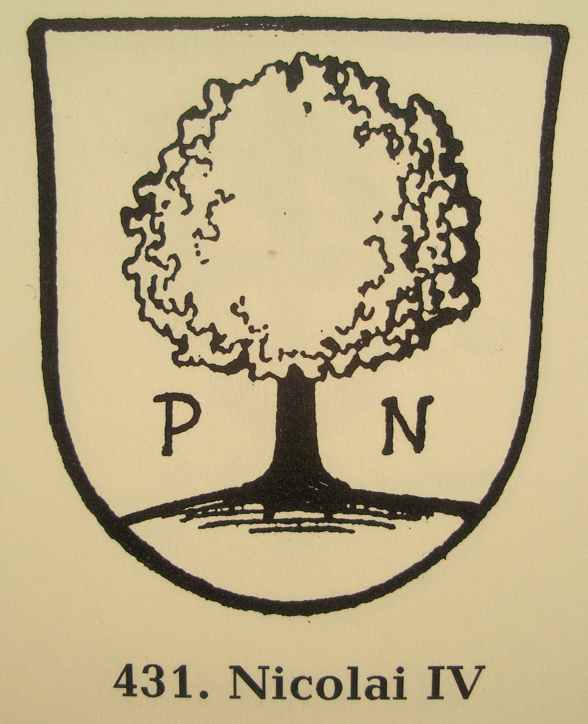 Siegel des Pfarrers Philipp Nicolai